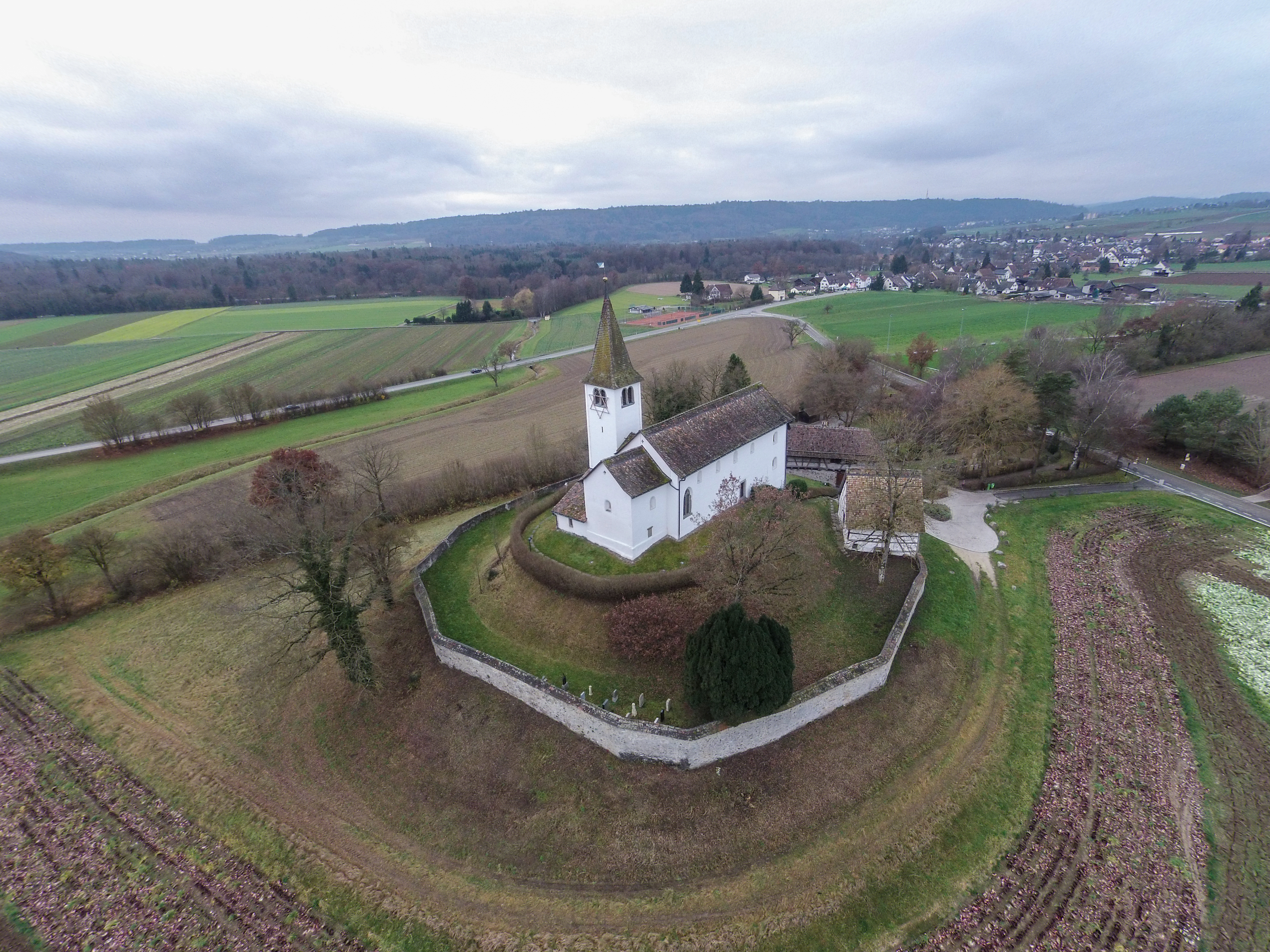 Germany, Baden-Württemberg, Bergkirche St. Michael in Büsingen am Hochrhein